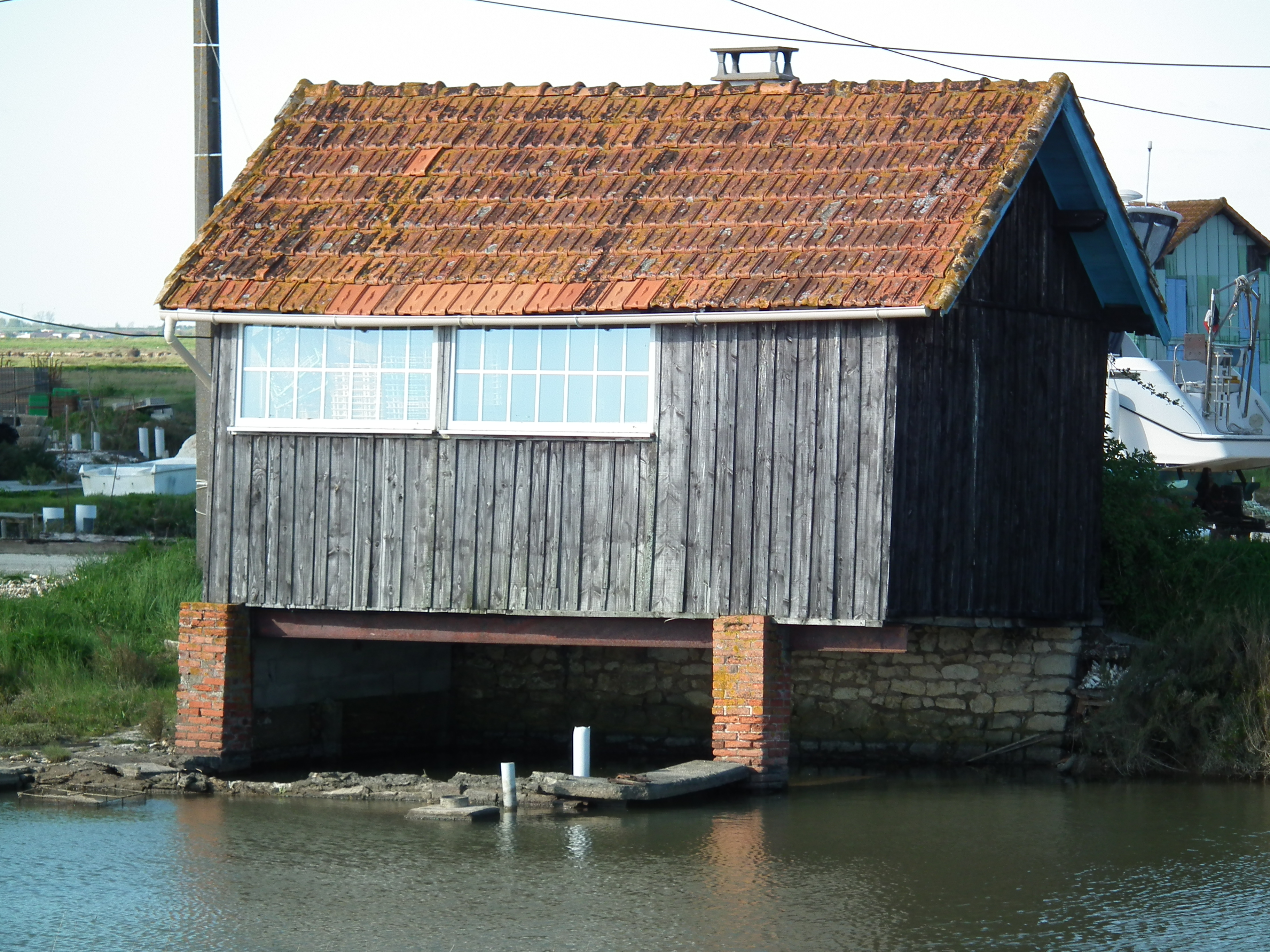 Une cabane ostréicole à Etaules